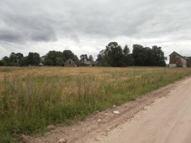 Vaade loodest mõisa ja oletatava linnuse asukohale. Ala on võsastunud.